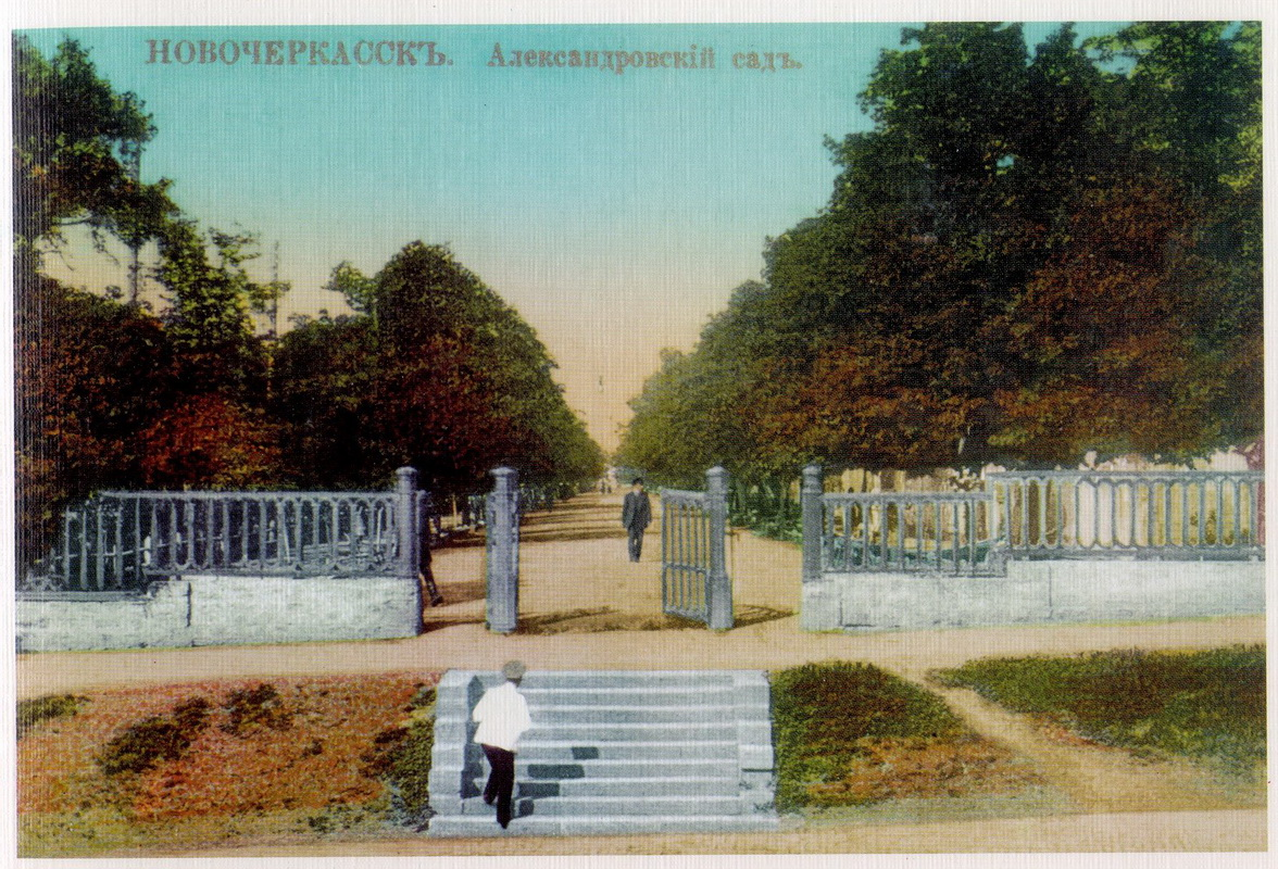 Александровский сад в Новочеркасске на дореволюционной открытке